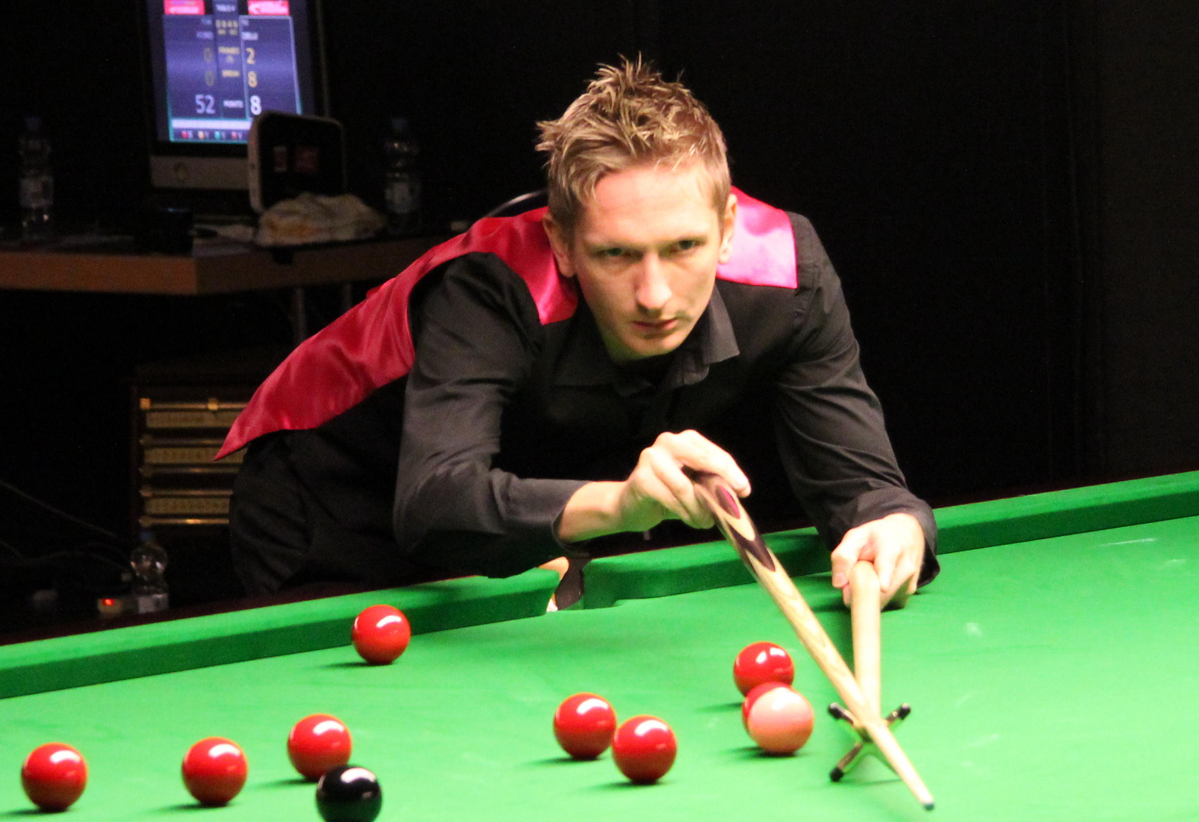 Andrew Pagett beim Paul Hunter Classic 2011